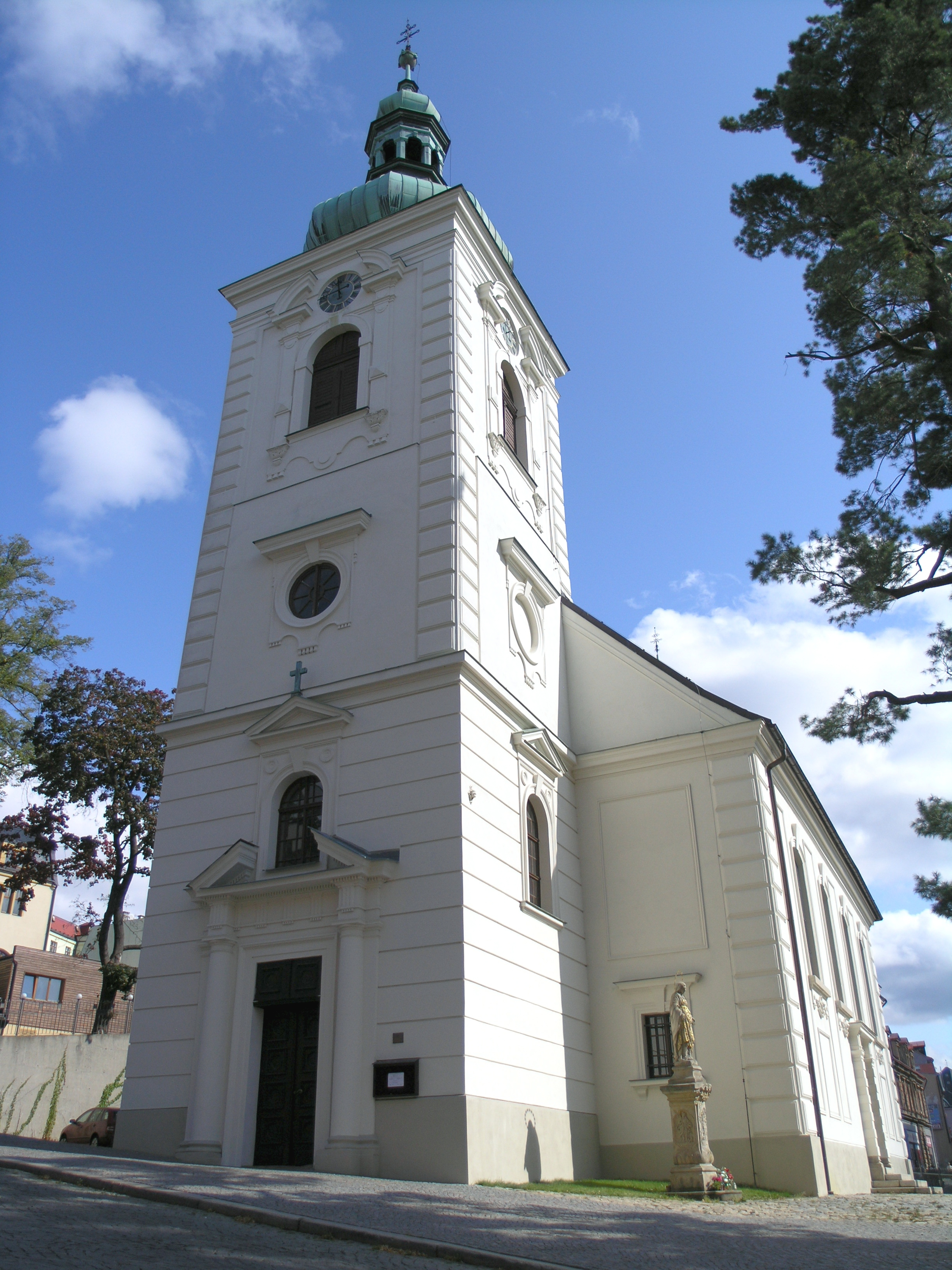 Česká republika, Jablonec nad Nisou - kostel svaté Anny (Kostelní ulice)